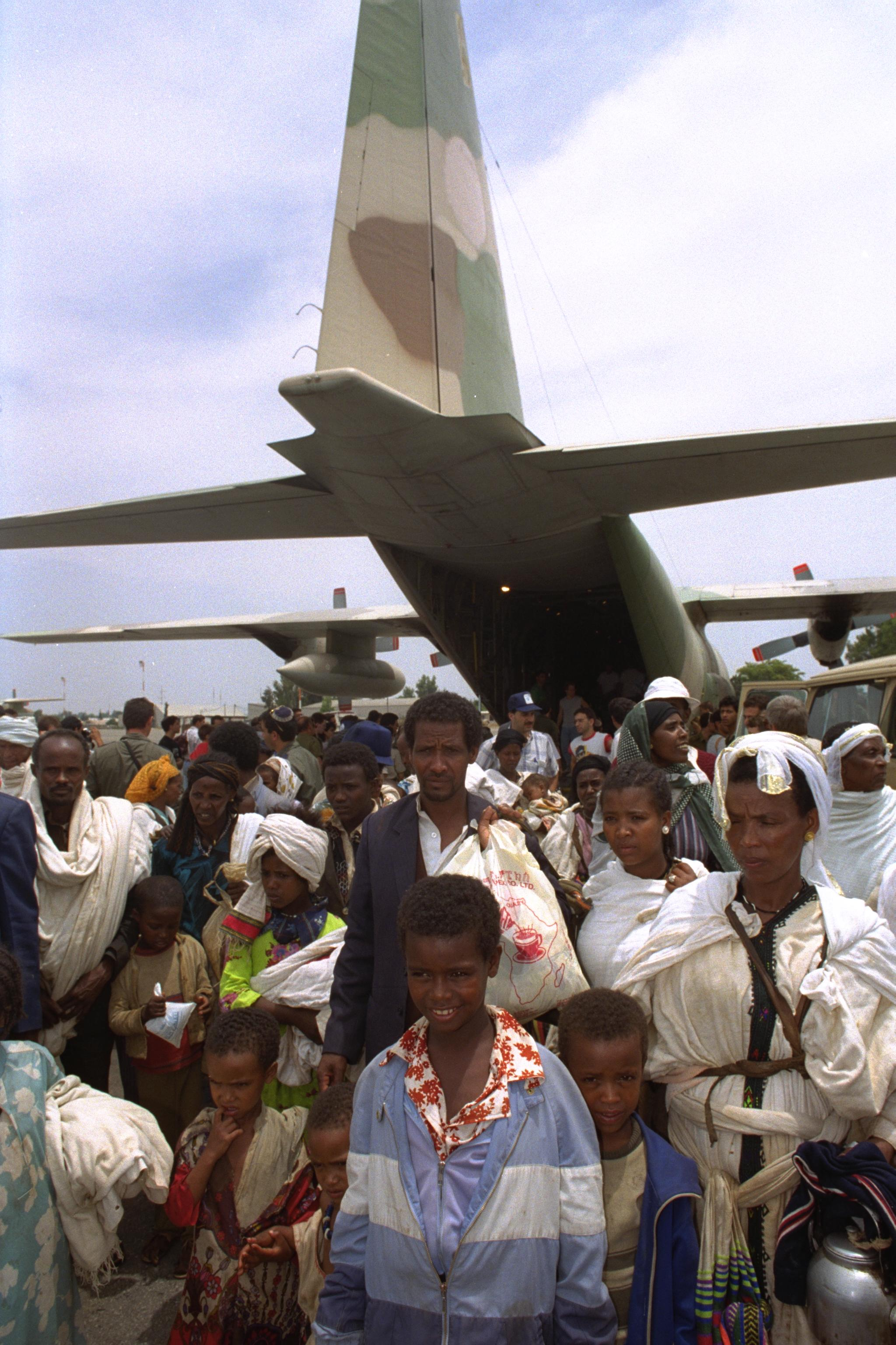 LINE OF ETHIOPIAN IMMIGRANTS STREAMING OUT OF THE HERCULES, WALKING TO THE BUSES, AIR FORCE BASE, OPERATION SOLOMON. עולים חדשים מאתיופיה יורדים ממטוס הרקולס במסגרת הבאתם לארץ, מבצע שלמה